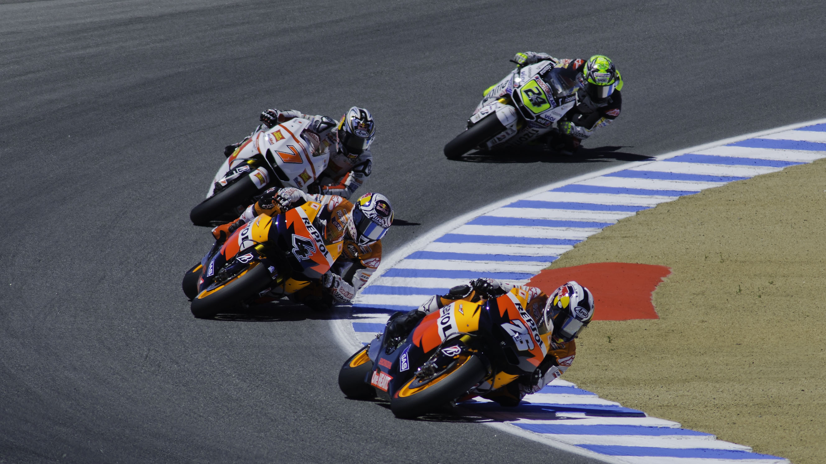 PedrosaDoviziosoAoyamaElias-Turn5